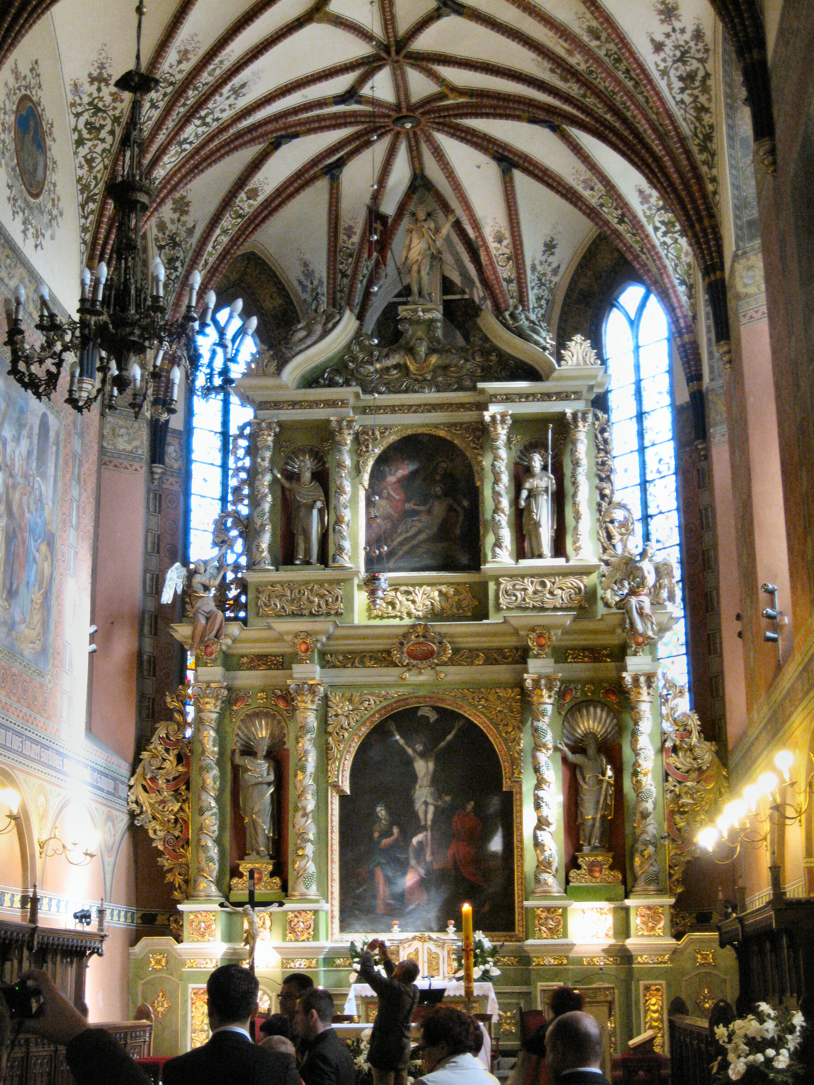 kościół parafialny p.w. Podwyższenia Krzyża Św. ul Kardynała Wyszyńskiego ( d.1 Maja 32) 6 Tczew, Tczew